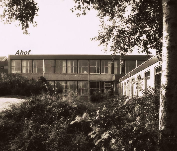 Een oude foto van de Ahof te Leeuwarden